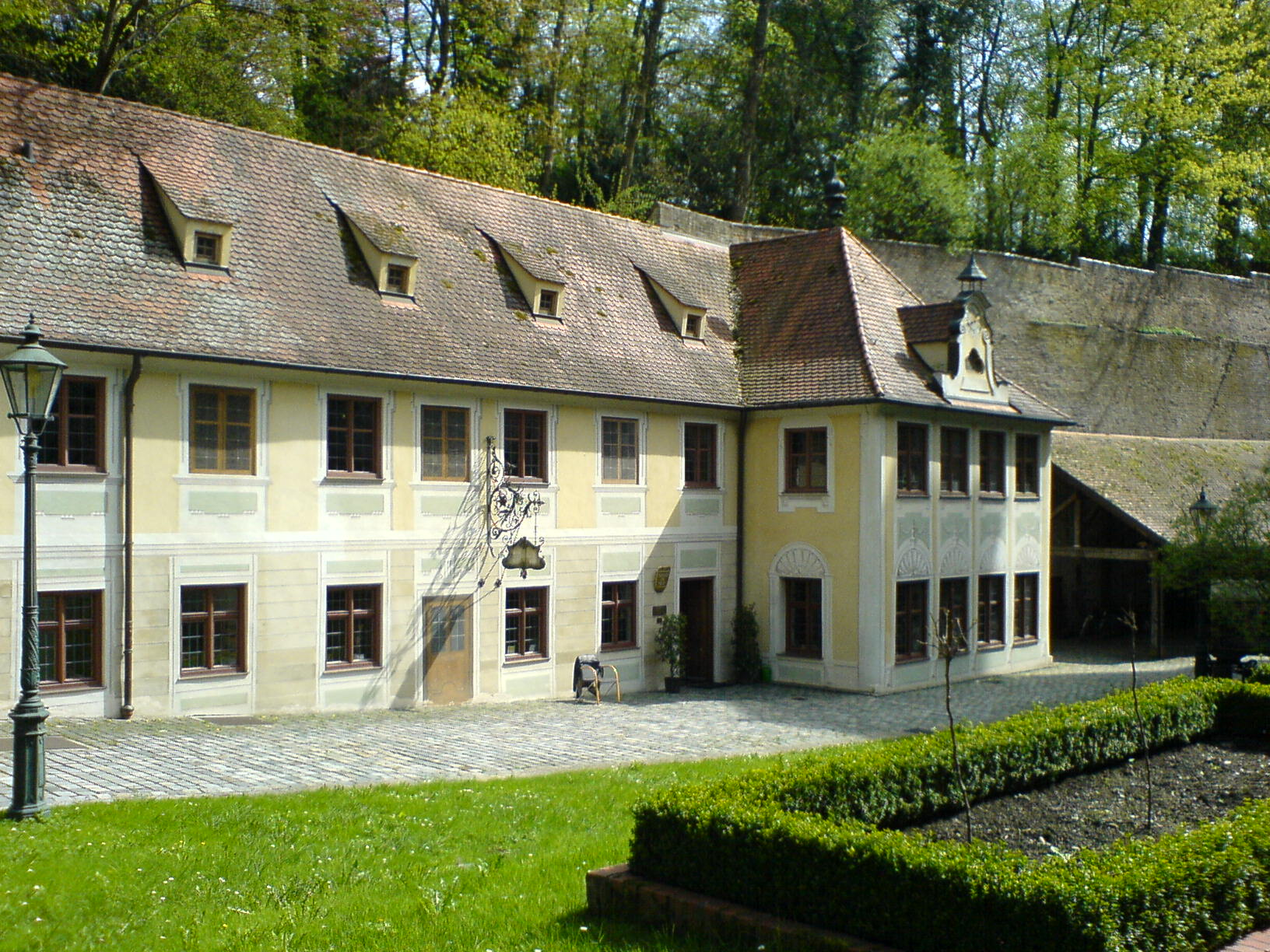 Das Brunnenmeisterhaus in Augsburg beim Roten Tor.